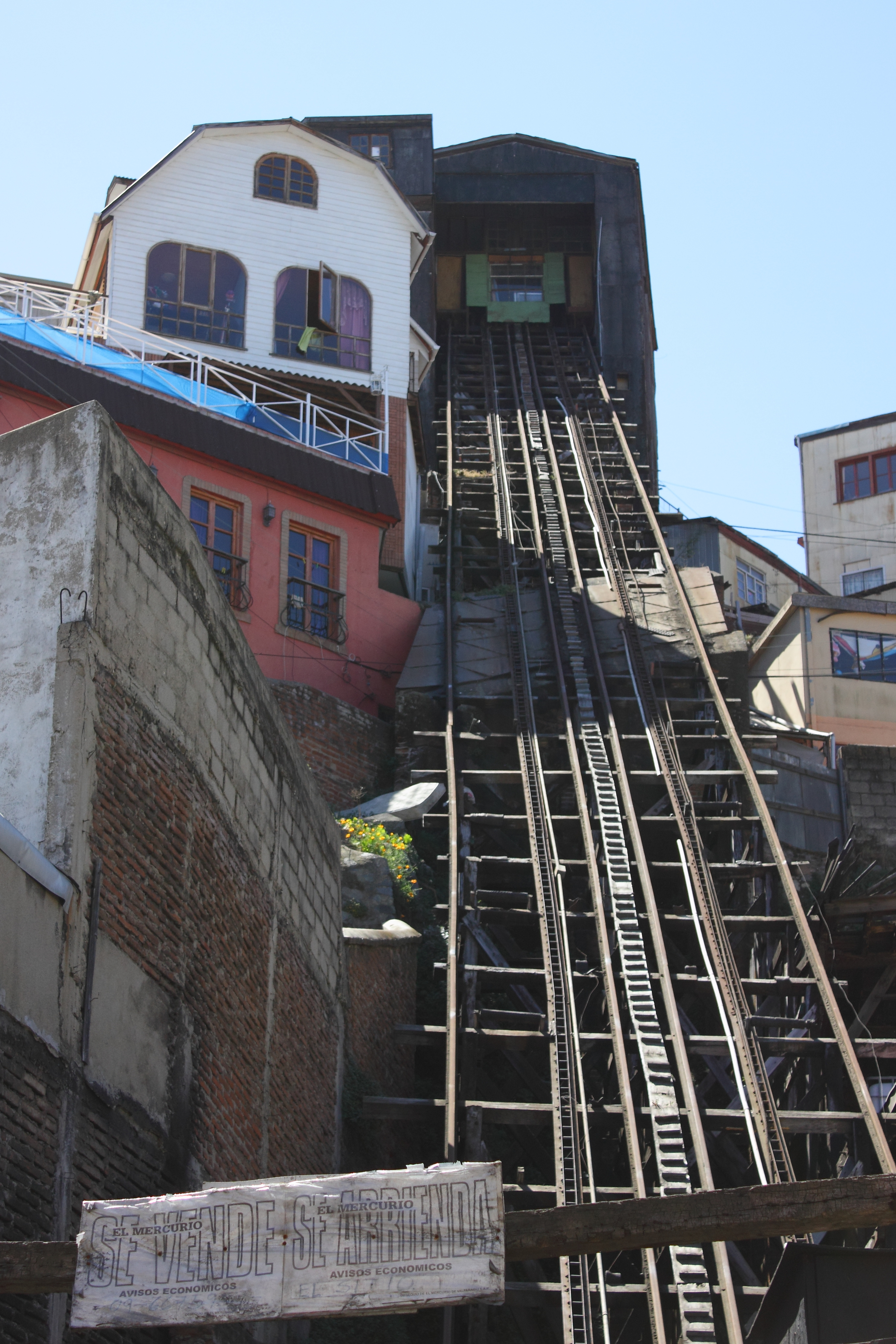 Ascensor Lecheros This is a photo of a national monument in Chile: 779